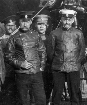 Севастопольская школа лётчиков Барон Герберт Оттович Буксгевден (крайний справа) (1877 - 1937) - начальник Качинской авиашколы, капитан II ранга, один из первых российских авиаторов.